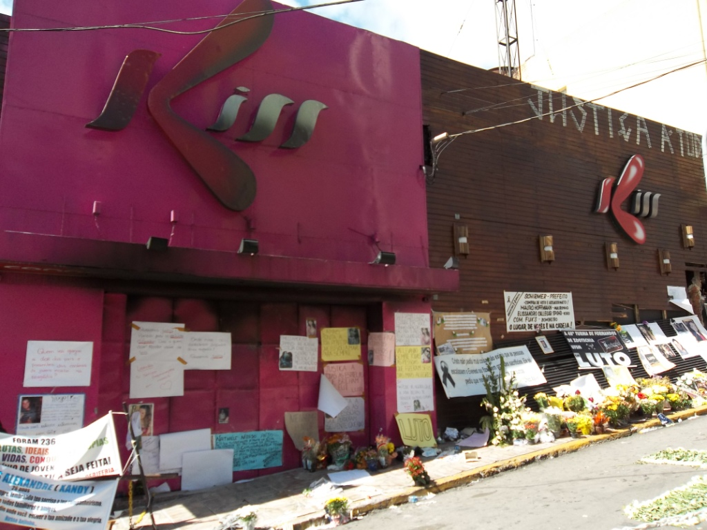 Boate que sofreu incêndio no município de Santa Maria - RS.